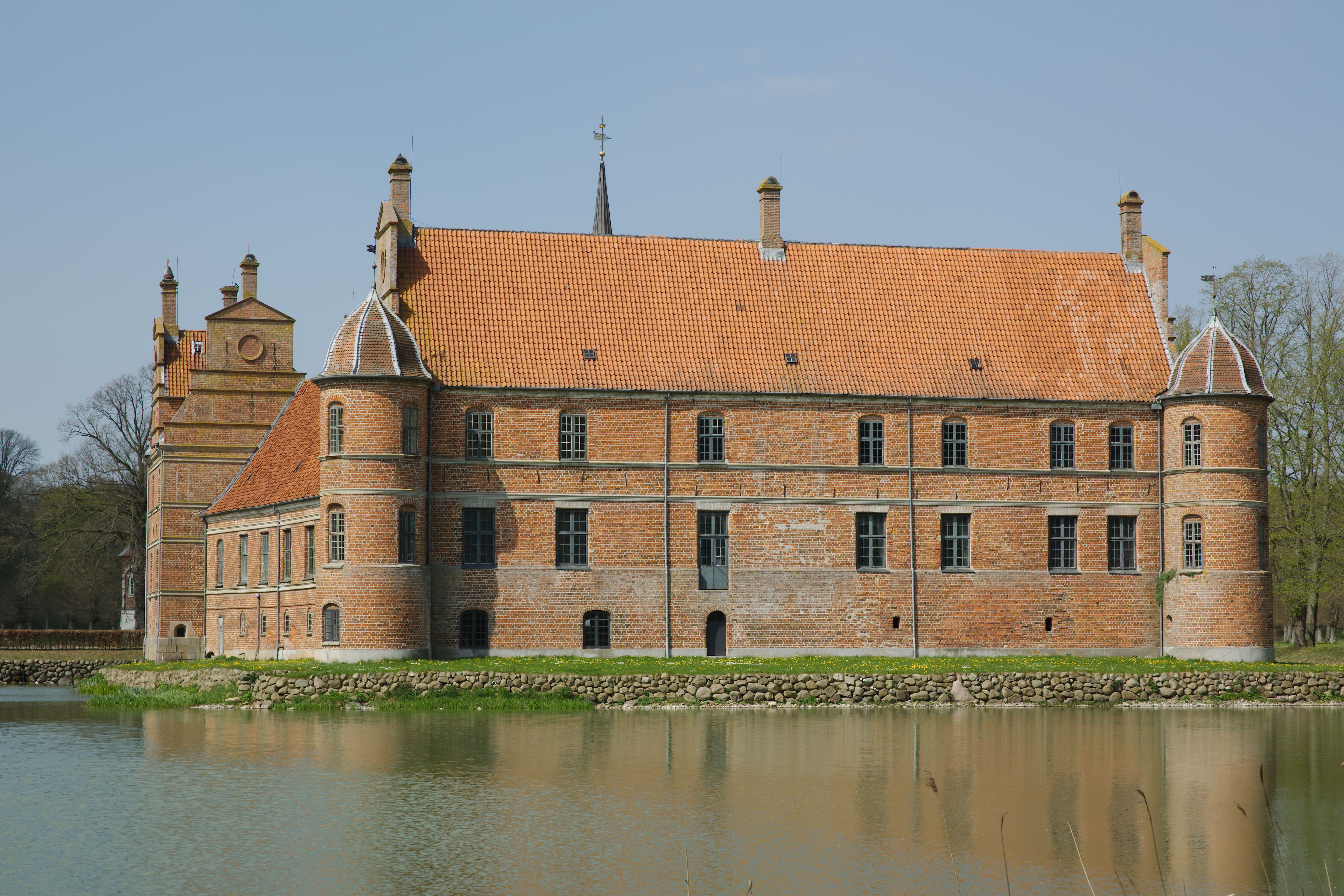 Rosenholm Slot